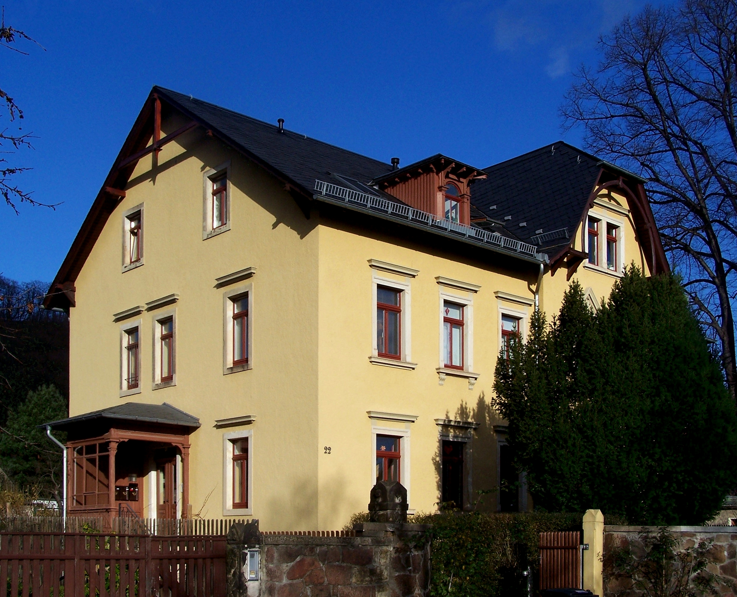 Sachsenstr. 22 in Radebeul